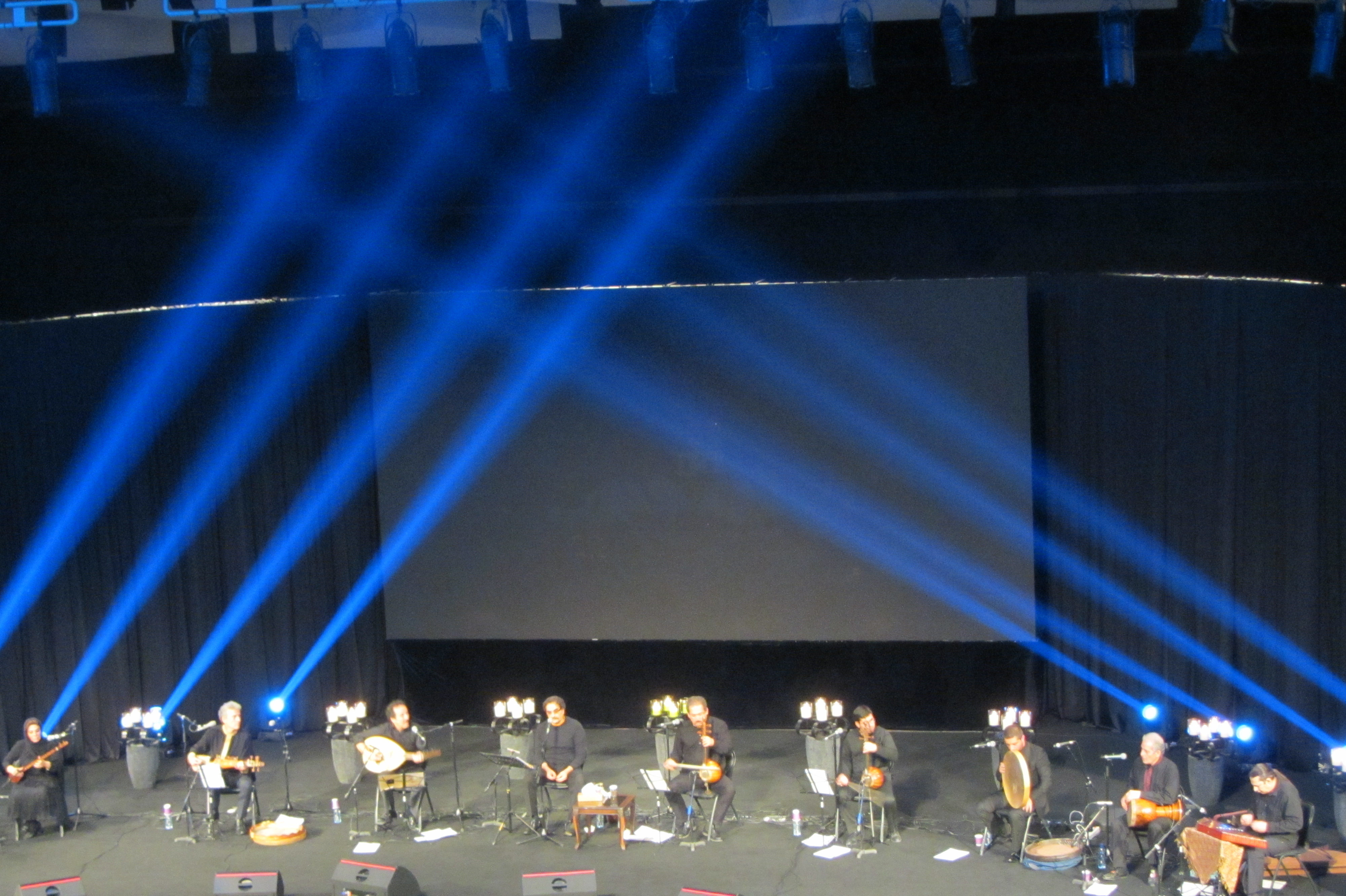 کامکارها